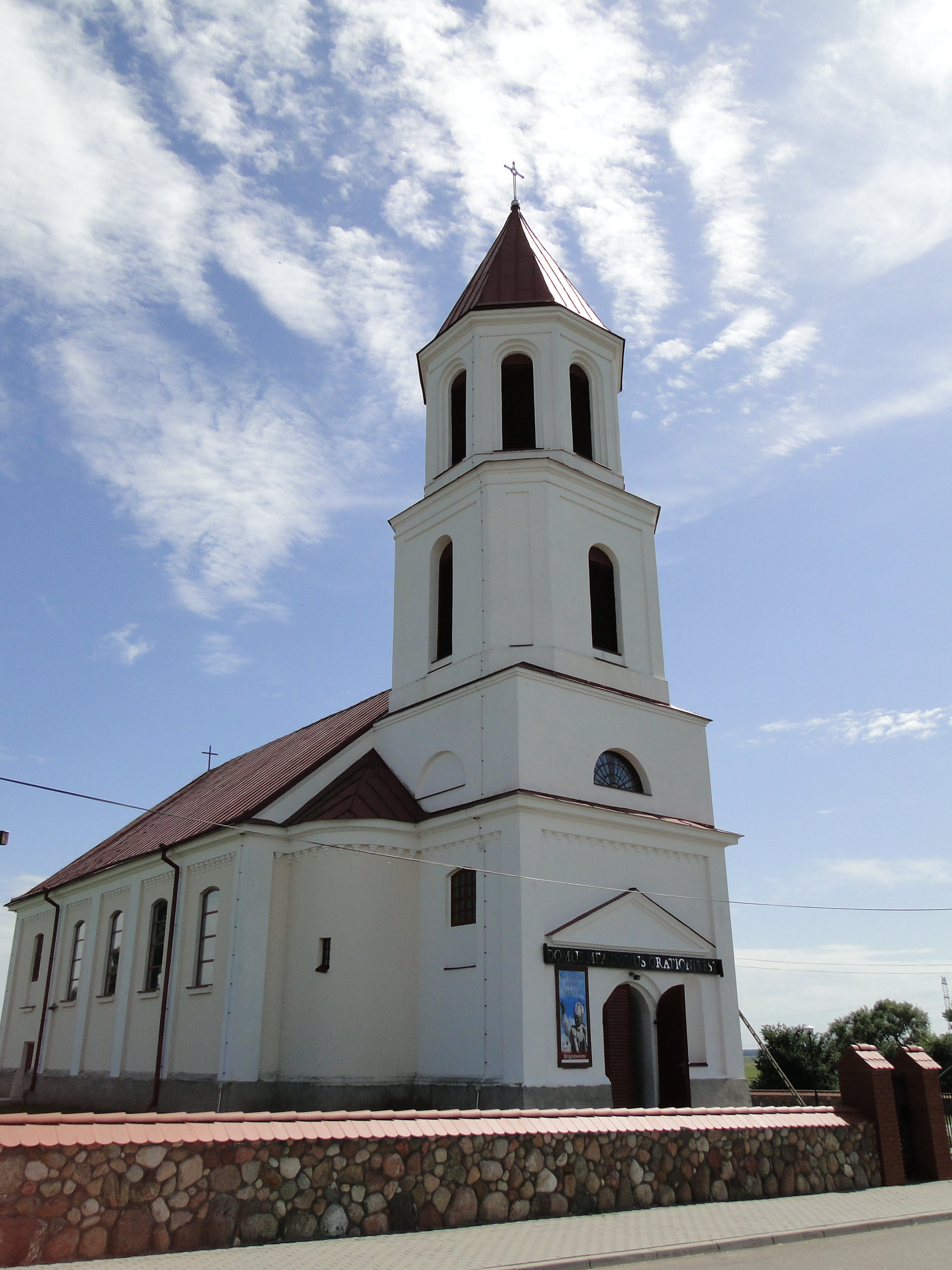 Suraż, kościół par. pw. Bożego Ciała, 1874-1876